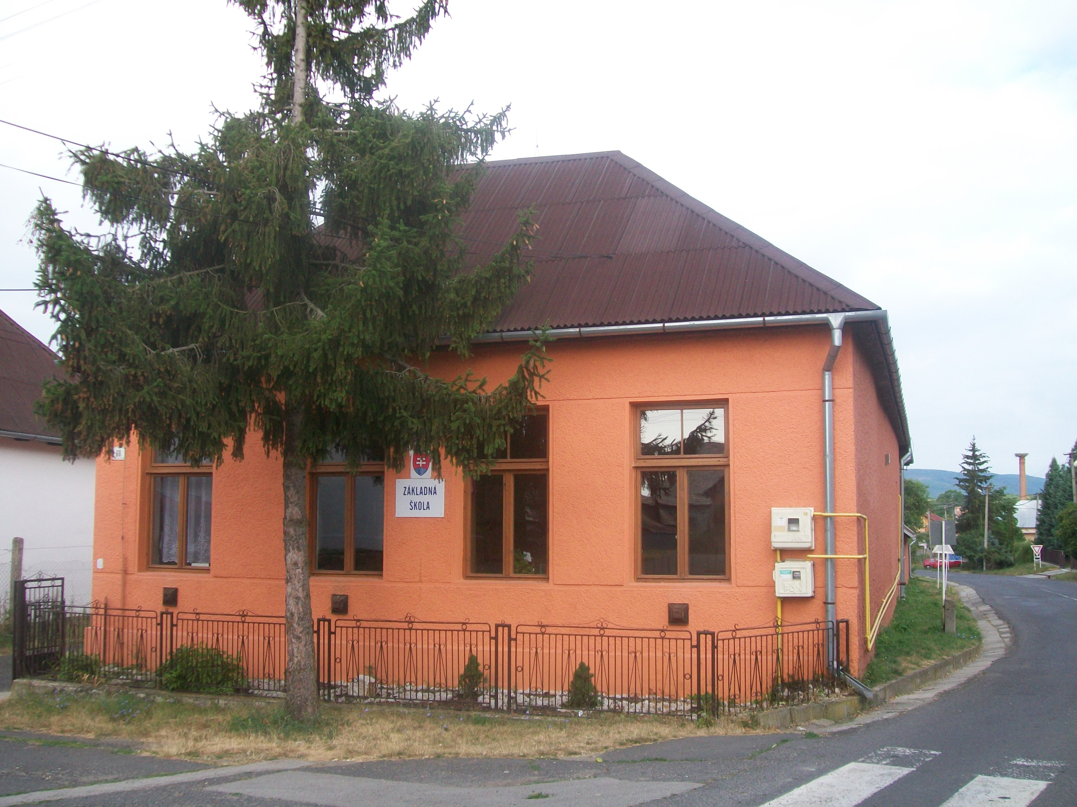 Základná škola v Pôtri